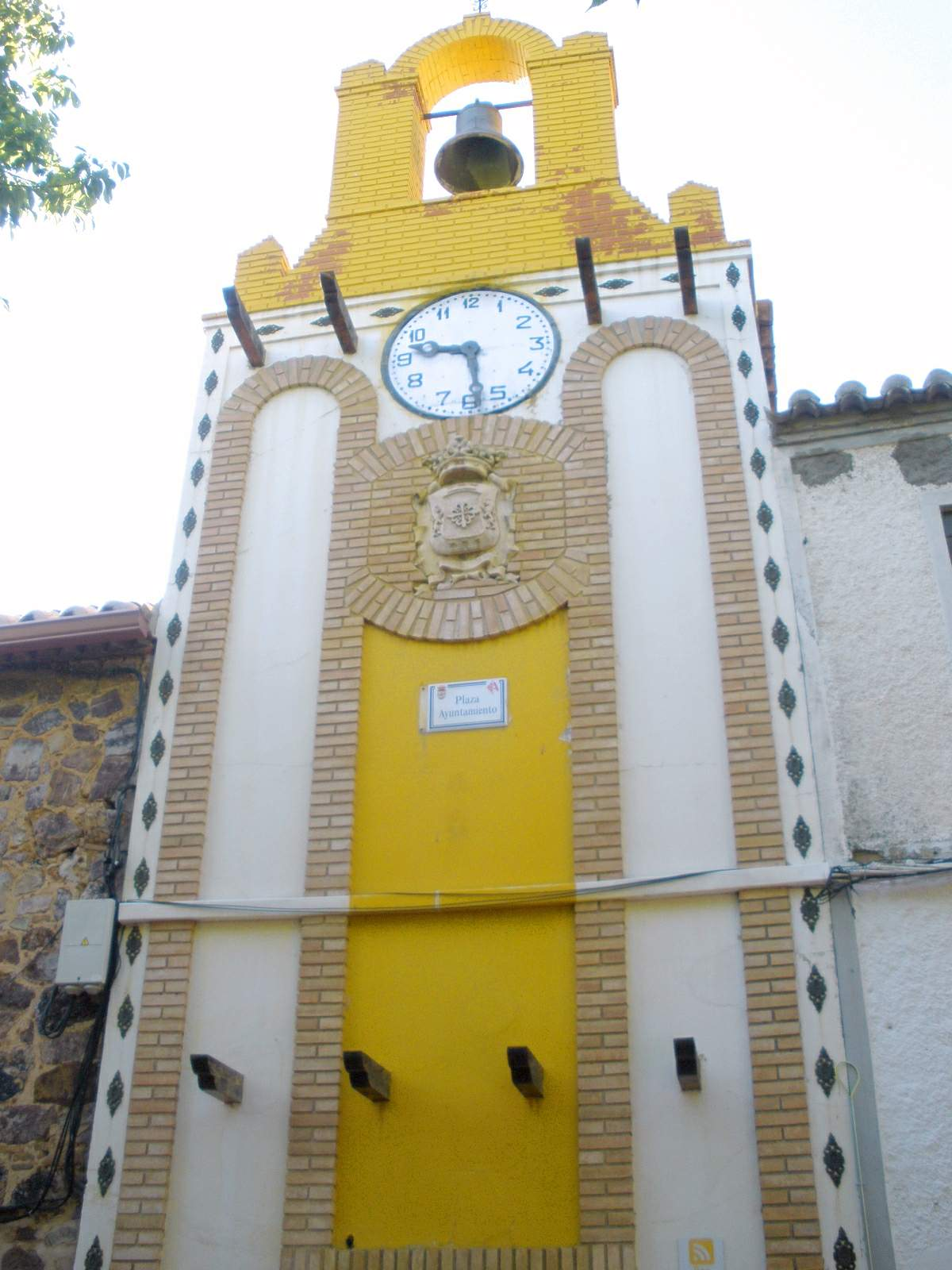 Plaza del Ayuntamiento (Argamasilla de Calatrava, Ciudad Real)